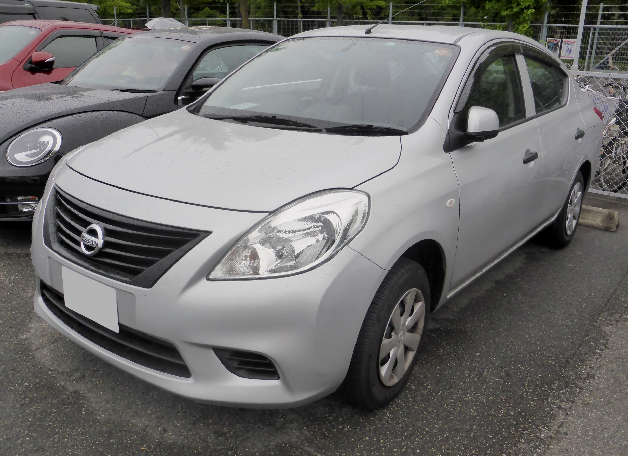 DBA-N17型日産・ラティオBをフロントから撮影。